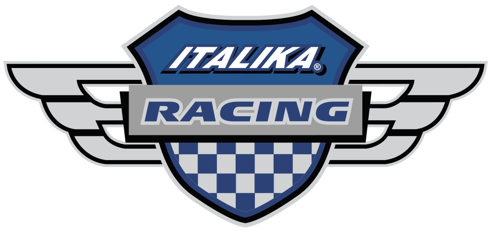 ITALIKA Racing es la plataforma deportiva de ITALIKA. Su objetivo es impulsar el motociclismo deportivo y fomentar el desarrollo de nuevos talentos.